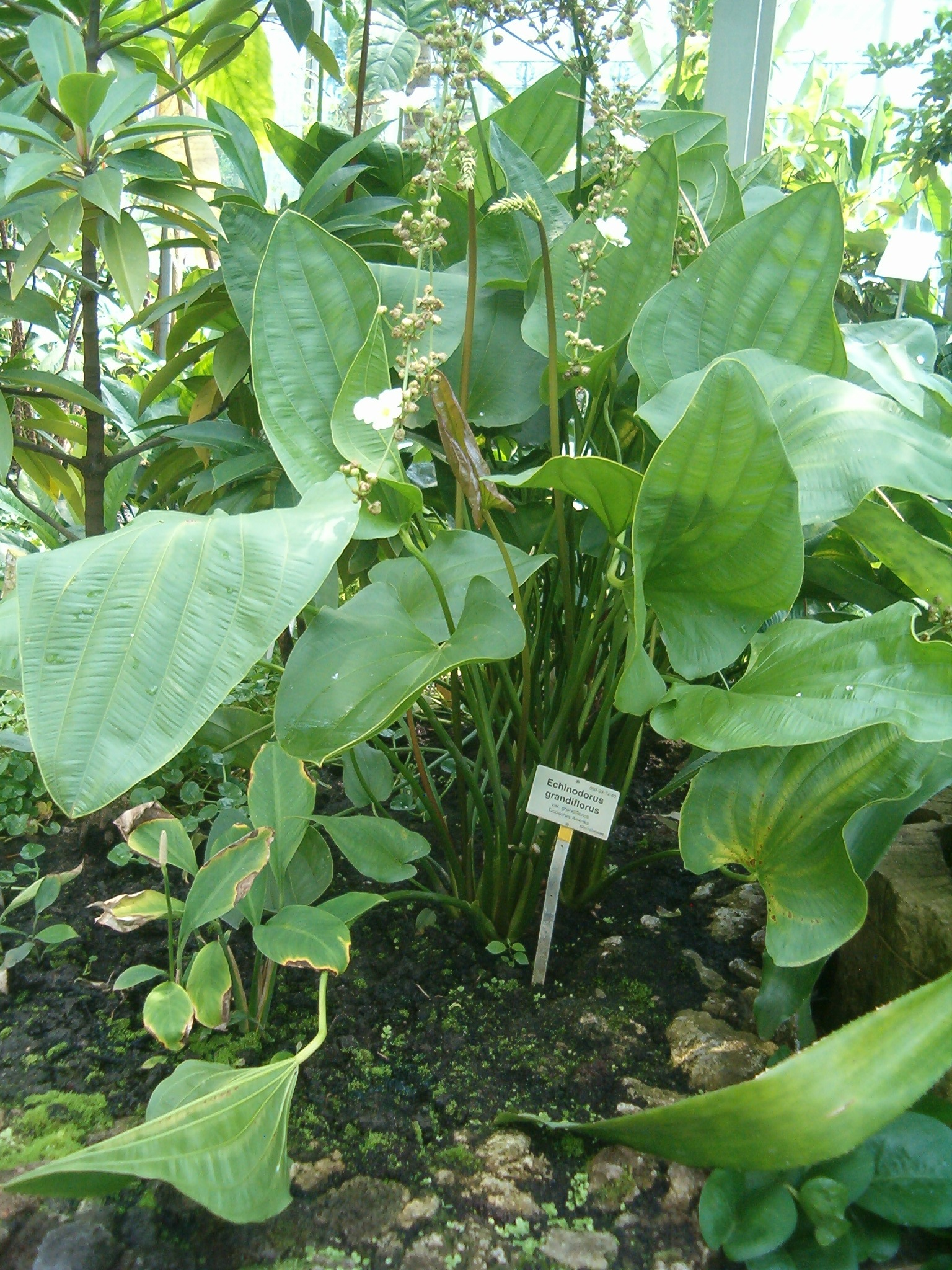 At Botanical Gardens Berlin-Dahlem Species Echinodorus grandiflorus